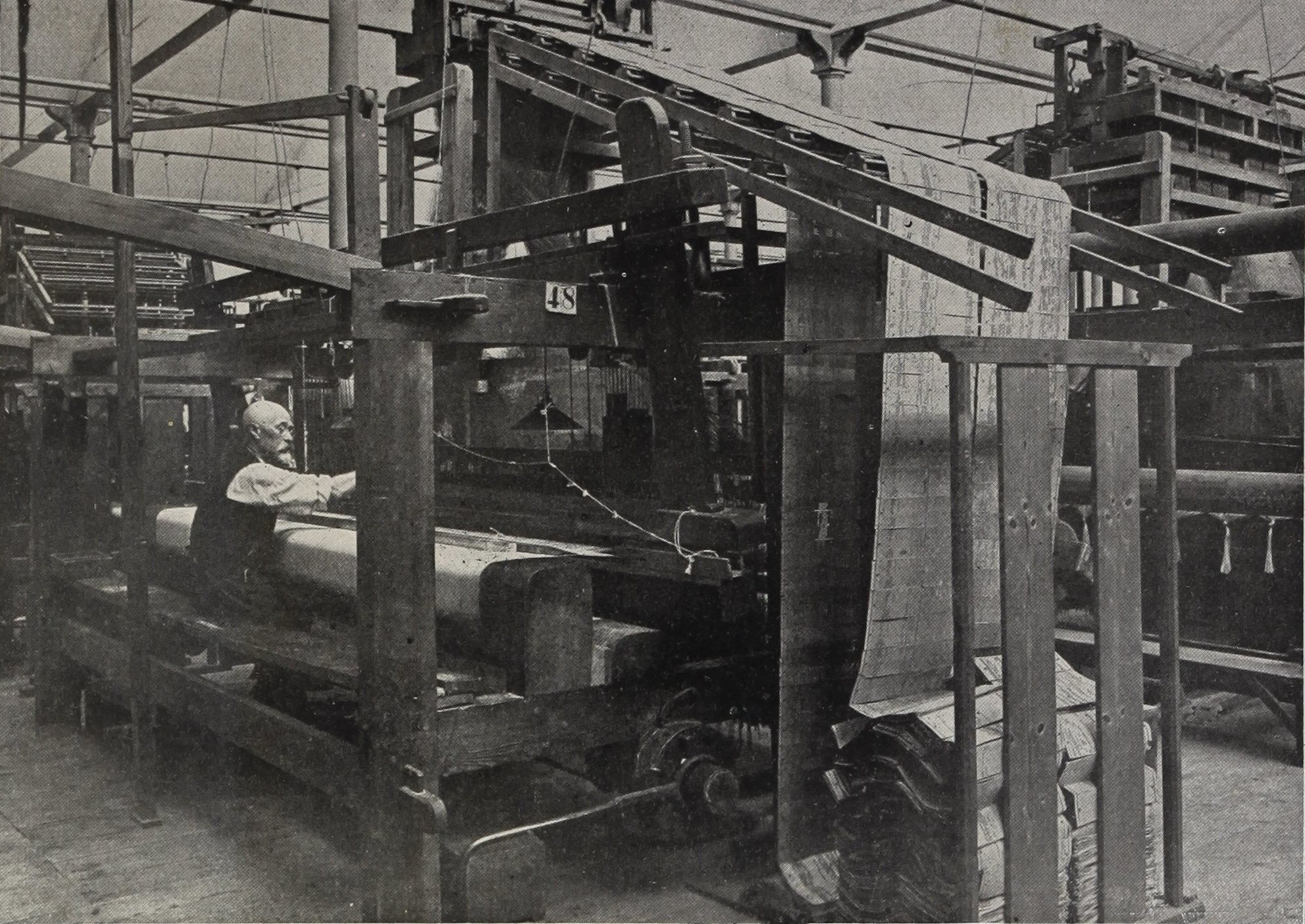 ZPB "Frotex" w Prudniku (dawniej "S. Fränkel"), 1932.